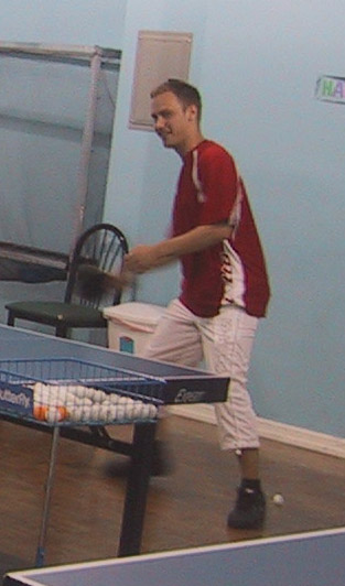 Bengt Baron, träning i New York 2005, fotot taget av uppladdaren.